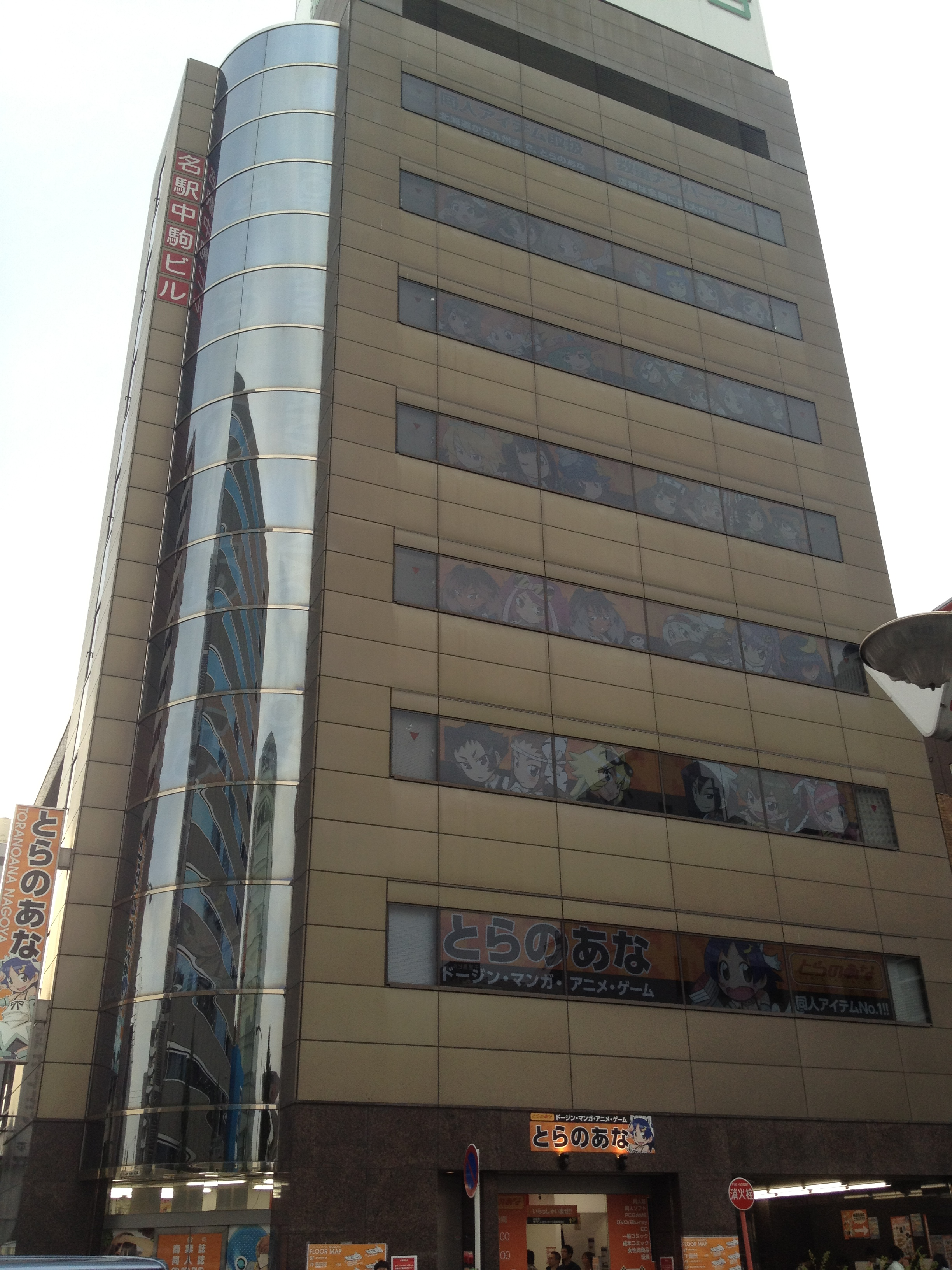 とらのあな名古屋店新店舗